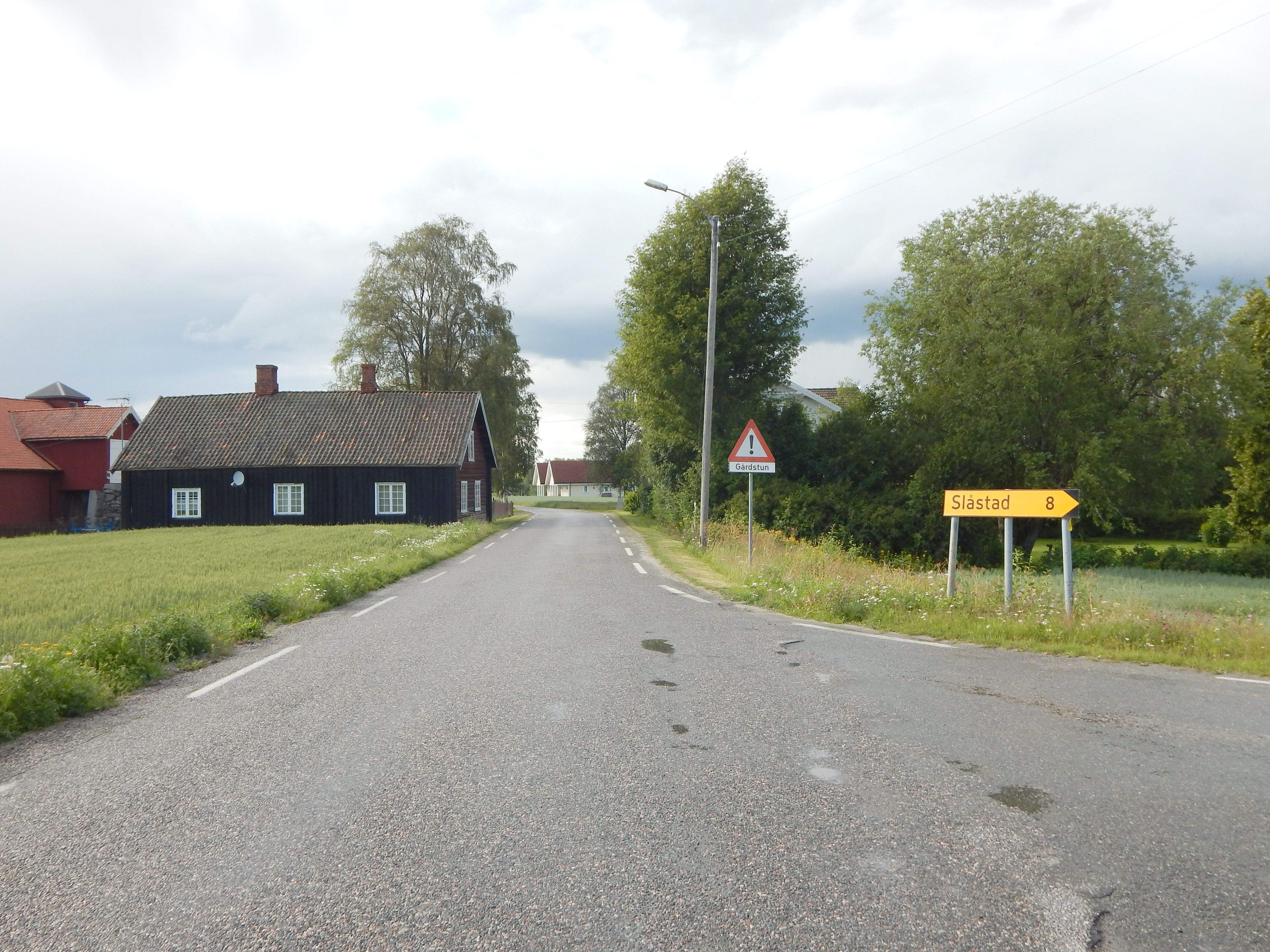 Skjulstadvegen nordover ved Nordre Skulstad